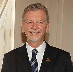 José Fortunati in 2012.